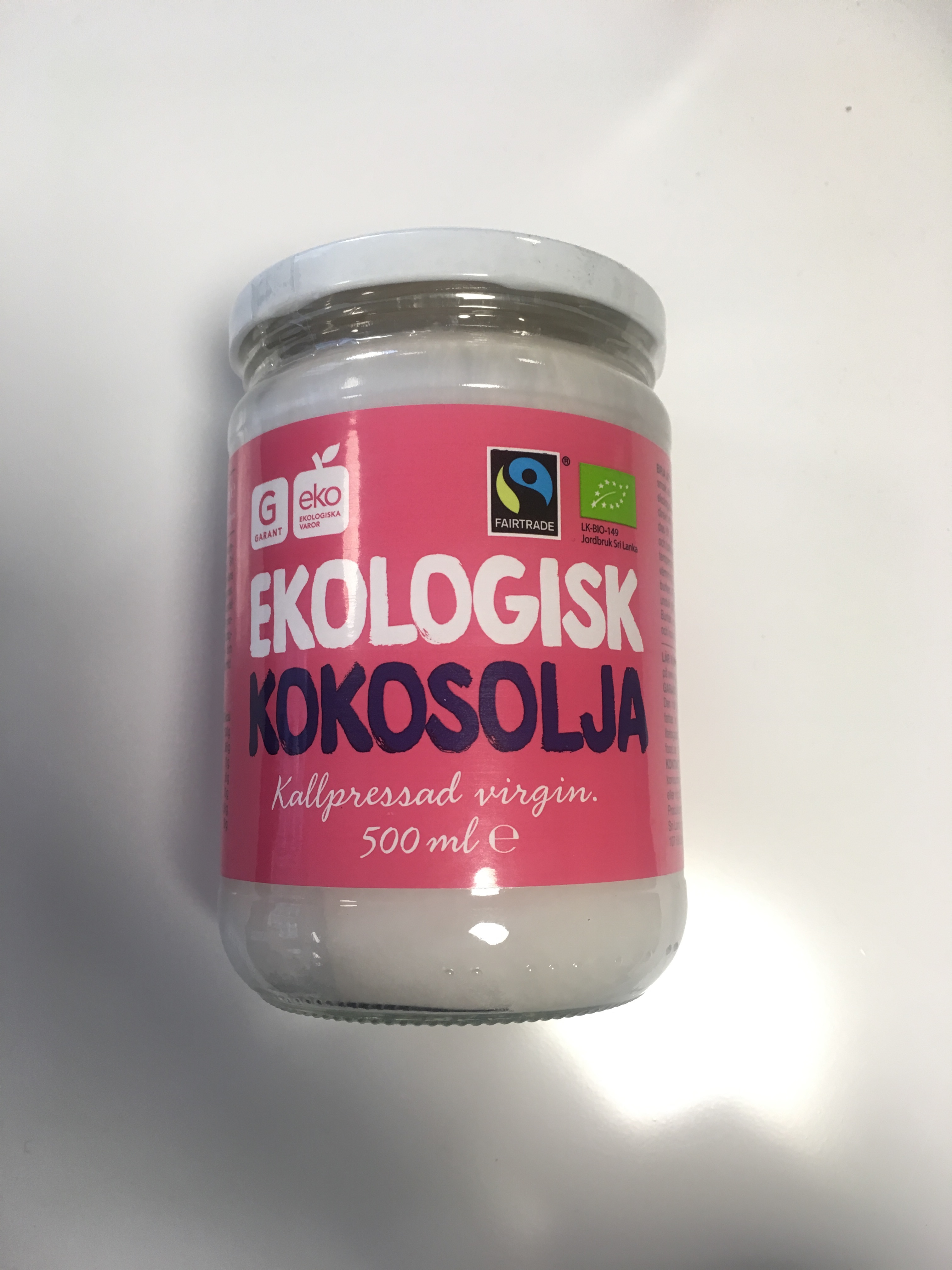 Ekologisk och Fairtrade-märkt kokosolja från varumärket Garant